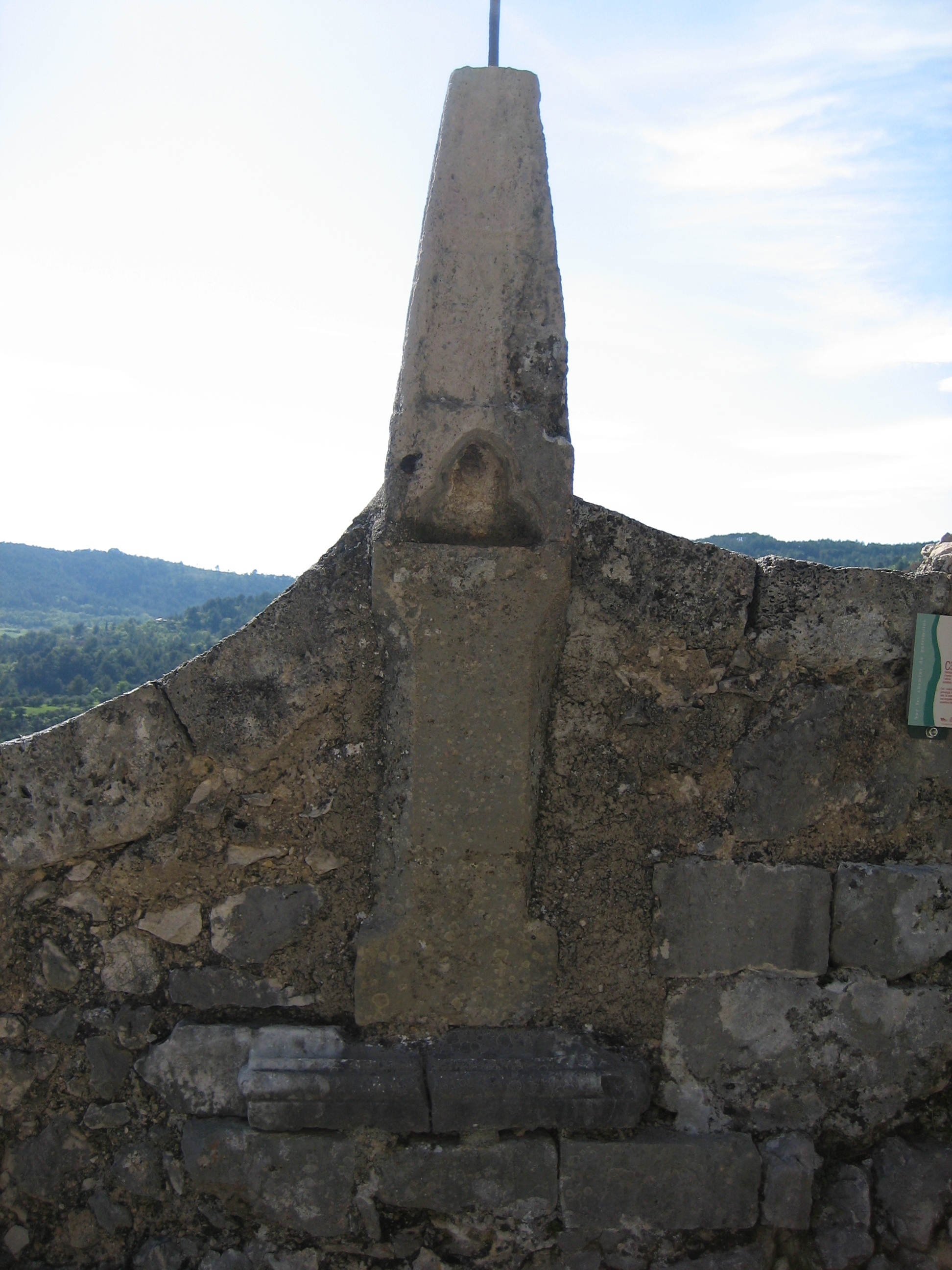 Alpes-de-Haute-Provence, Moustiers Selon la signalétique du parc naturel régional du Verdon, cet oratoire est l’un des plus anciens de toute la provence. Il aurait été érigé au XIVe siècle. Son allure, sa matière (il est en tuf) le distinguent parmi tous ceux que l’on rencontre sur le chemin de croix qui menait autrefois à Notre-Dame de Beauvoir. Les oratoires se nommaient « pillon, pierron » en provençal. Ils présentaient souvent, sur la face tournée vers le chemin, une excavation centrale dans laquelle une coupelle contenait de l’eau bénite. C’est ici une couverture tréflée. La grande croix qui le surmonte supportait un coq métallique.